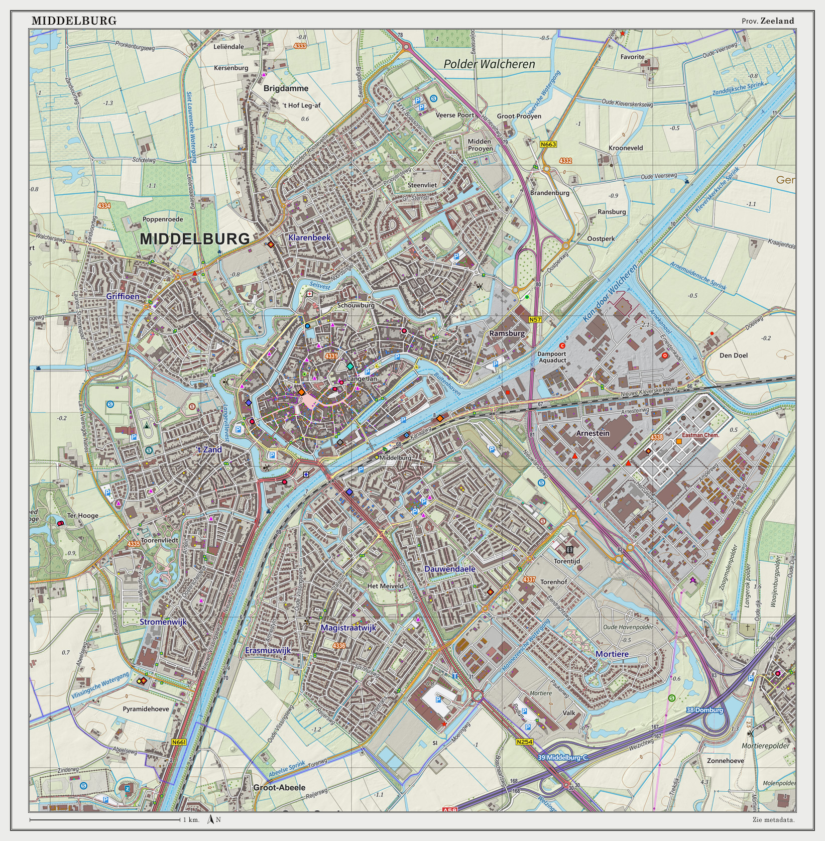 Topografische kaart van Middelburg (woonplaats). Resolutie: 300 pixels/km. Kaartbeeld samengesteld uit de open geodata van de Top10NL en Top25namen (Basisregistratie Topografie, Kadaster), Creative Commons BY licentie. Gebouwvlakken uit open geodata BAG extract. Wegen uit de OpenStreetMap. Reliëfschaduw uit de Actuele Hoogtekaart AHN2. Samenstelling en kleurenschema: Jan-Willem van Aalst, met QGIS2. Zie ook de Legenda.